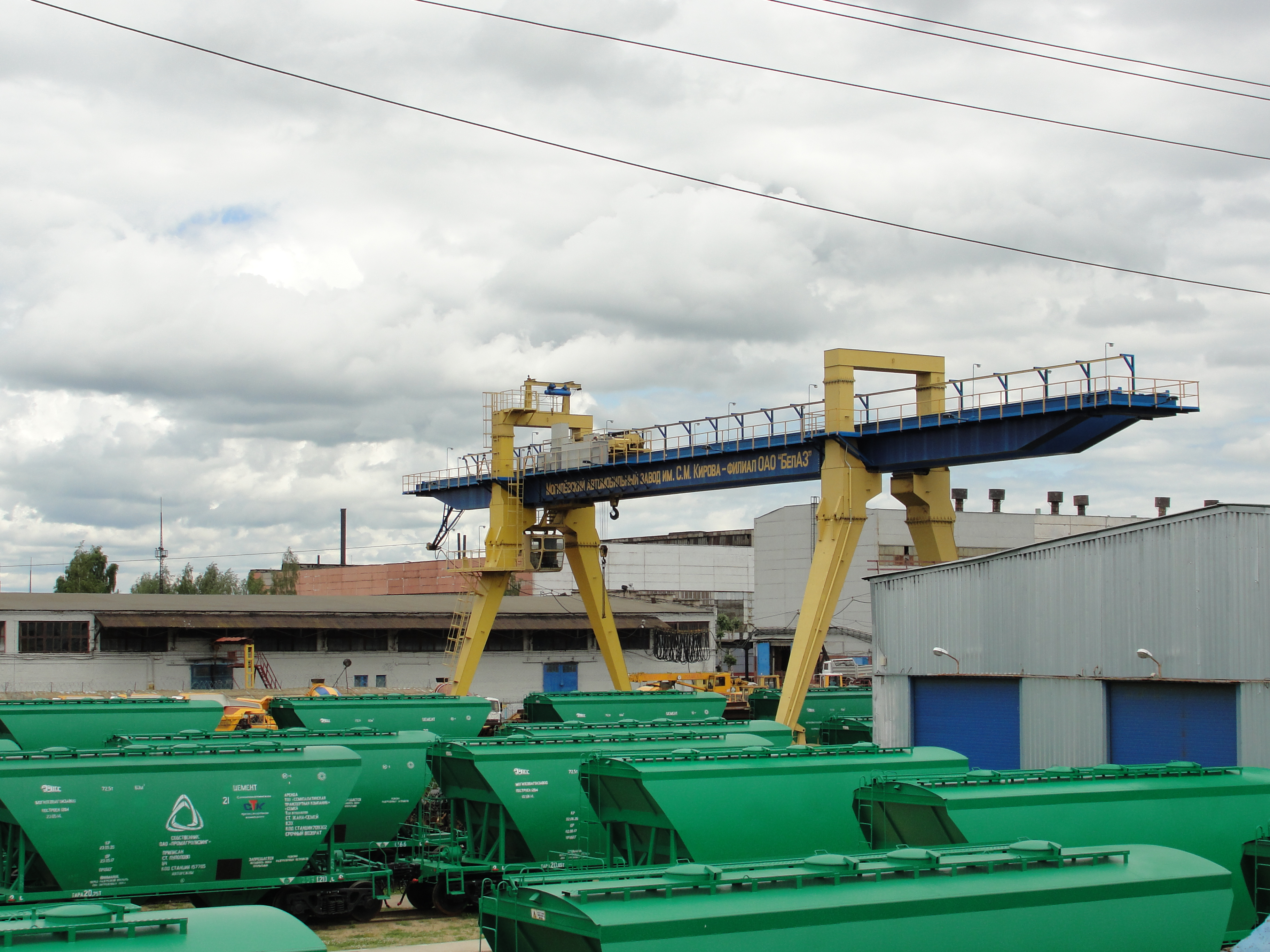 Могилевский автомобильный з-д им. Кирова